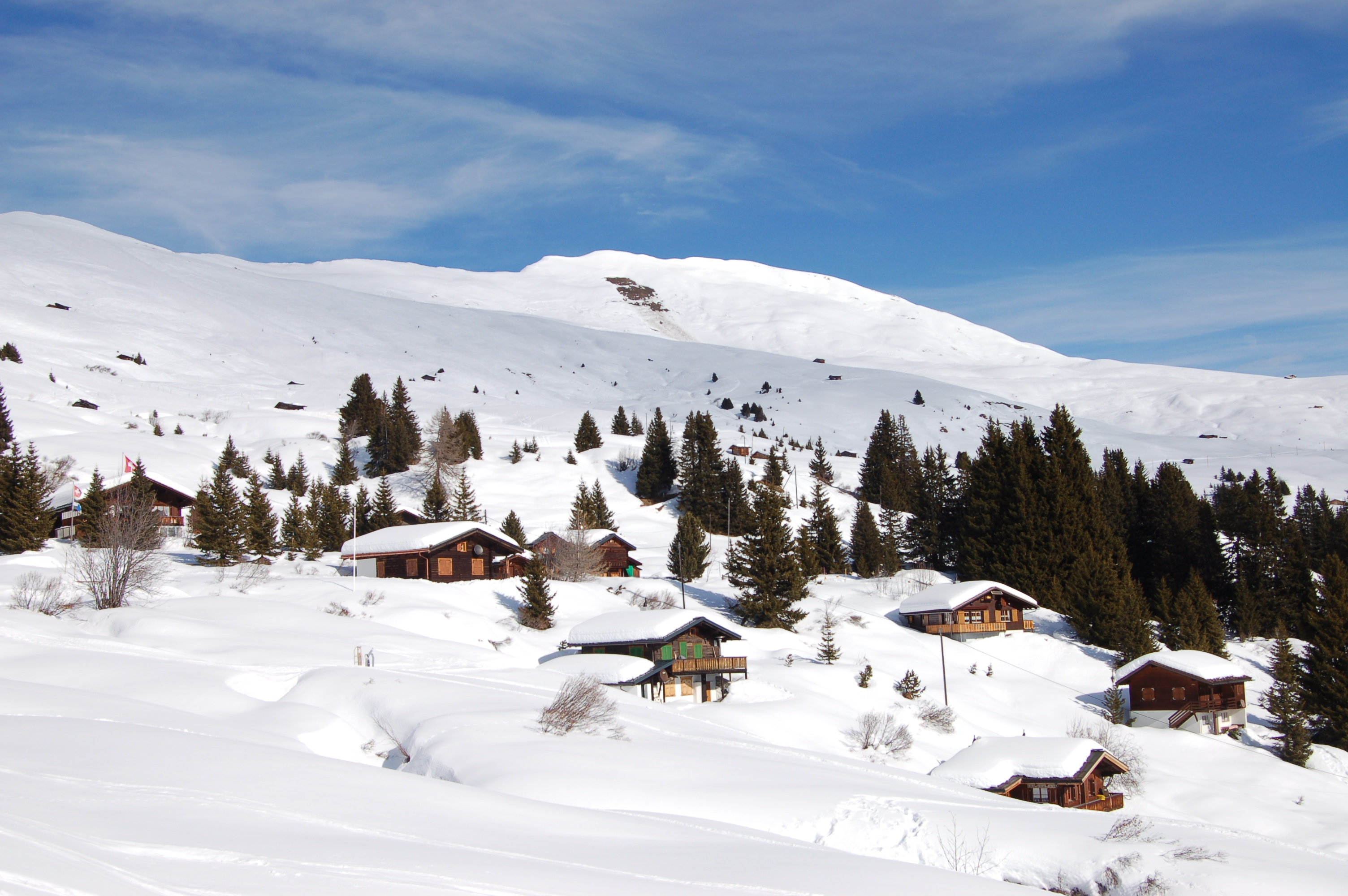 Hochwang Skigebiet zwischen Chur und Arosa